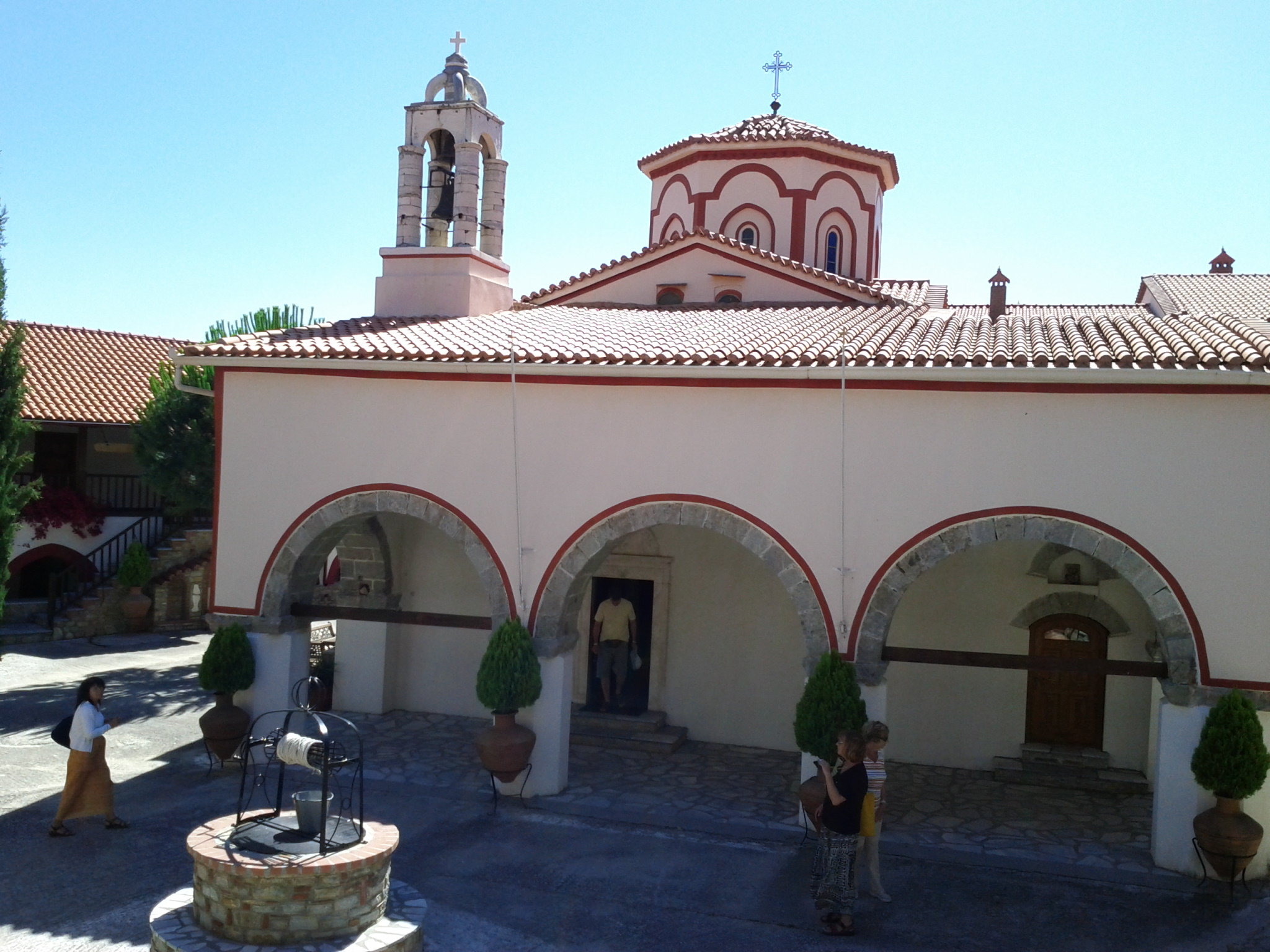 Moni Megali Panagia